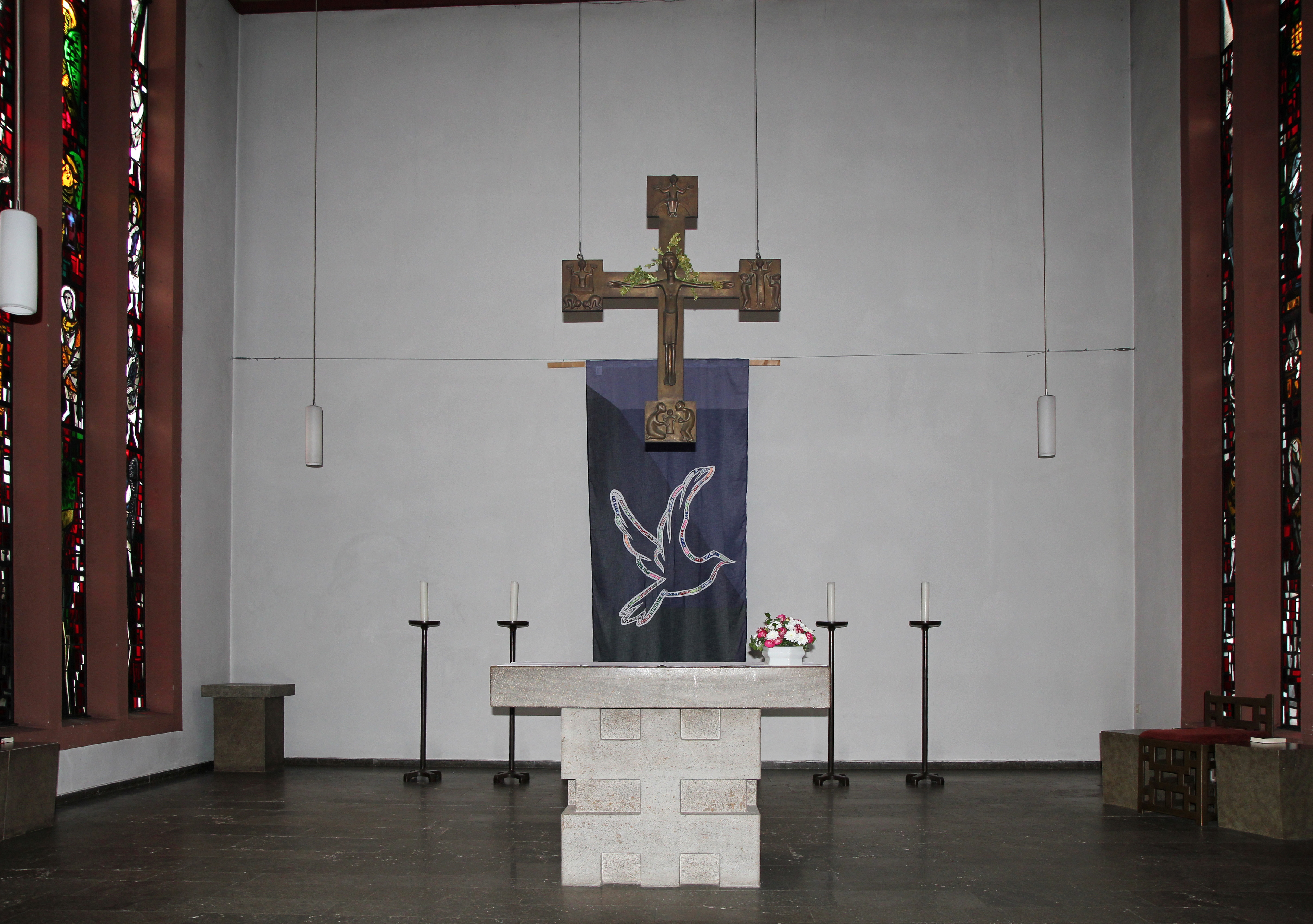 Erftstadt-Liblar